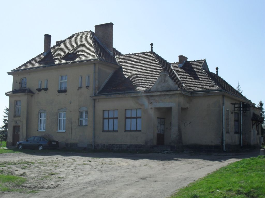 Widok dworca kolejowego w Stronnie od strony drogi.